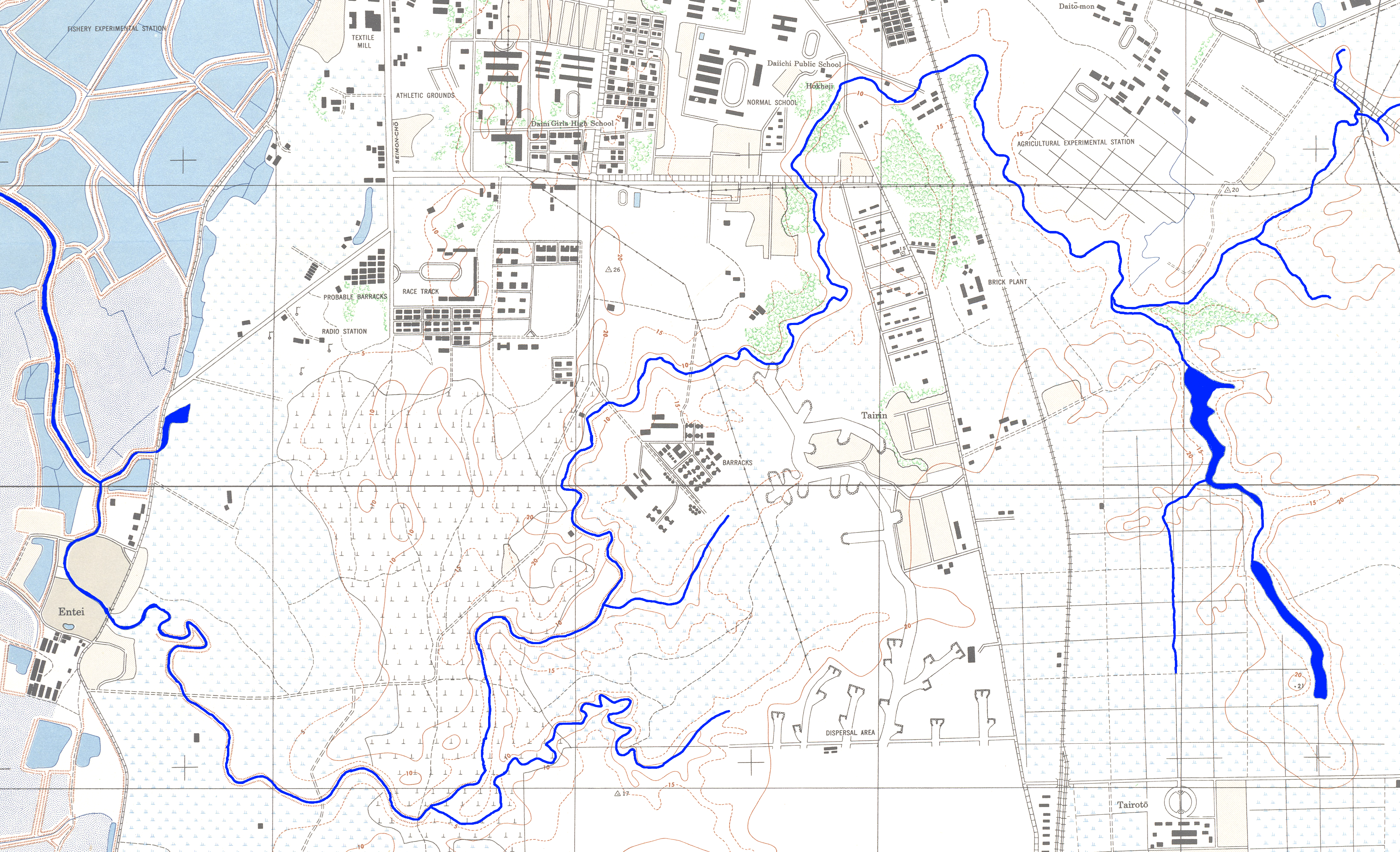 美軍地圖（1944年）上的竹溪流域